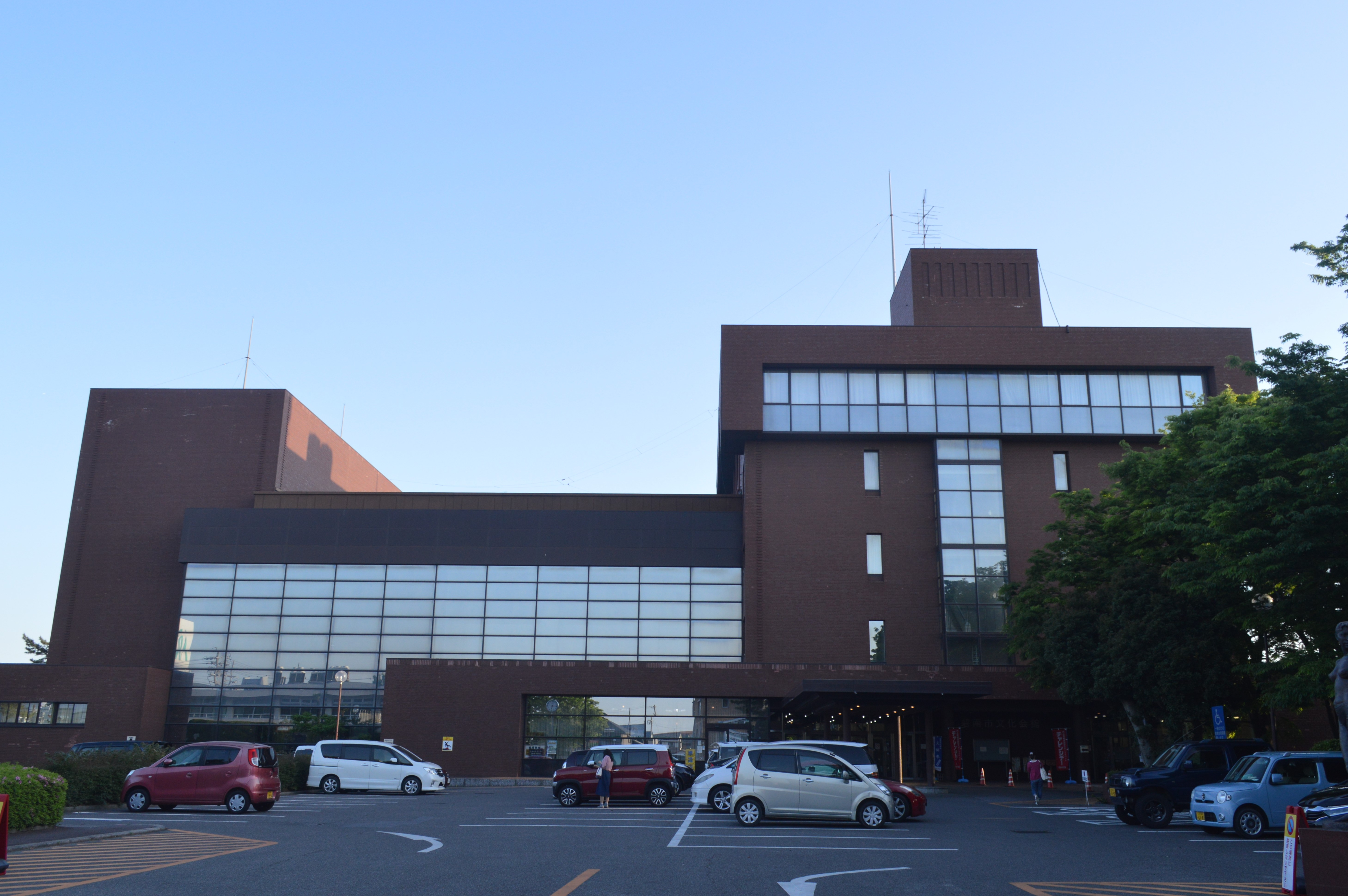 愛知県碧南市の碧南市文化会館。